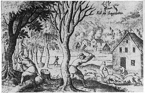 Лістапад З кнігі "Rosarium et Officium B. Mariae Virginis...", 1672-1677 гг.